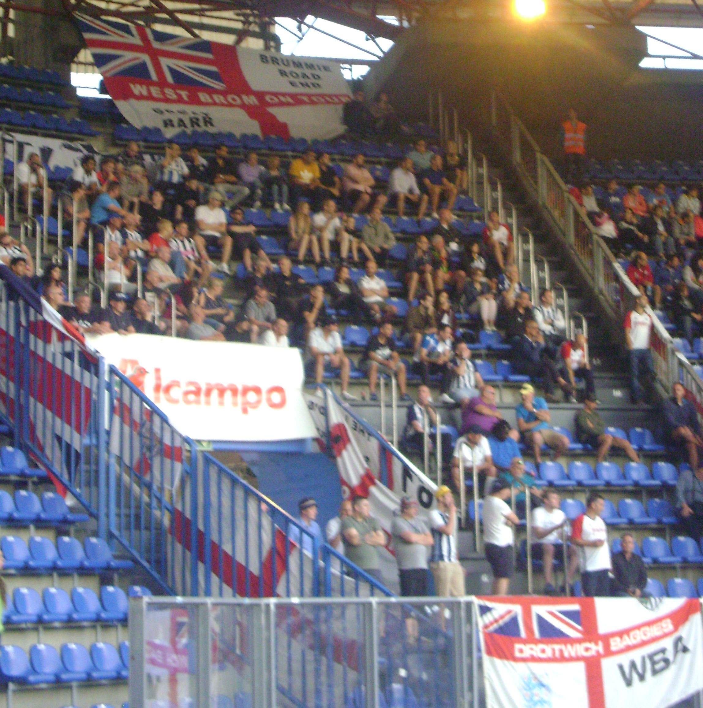 Aficionados del WBA.